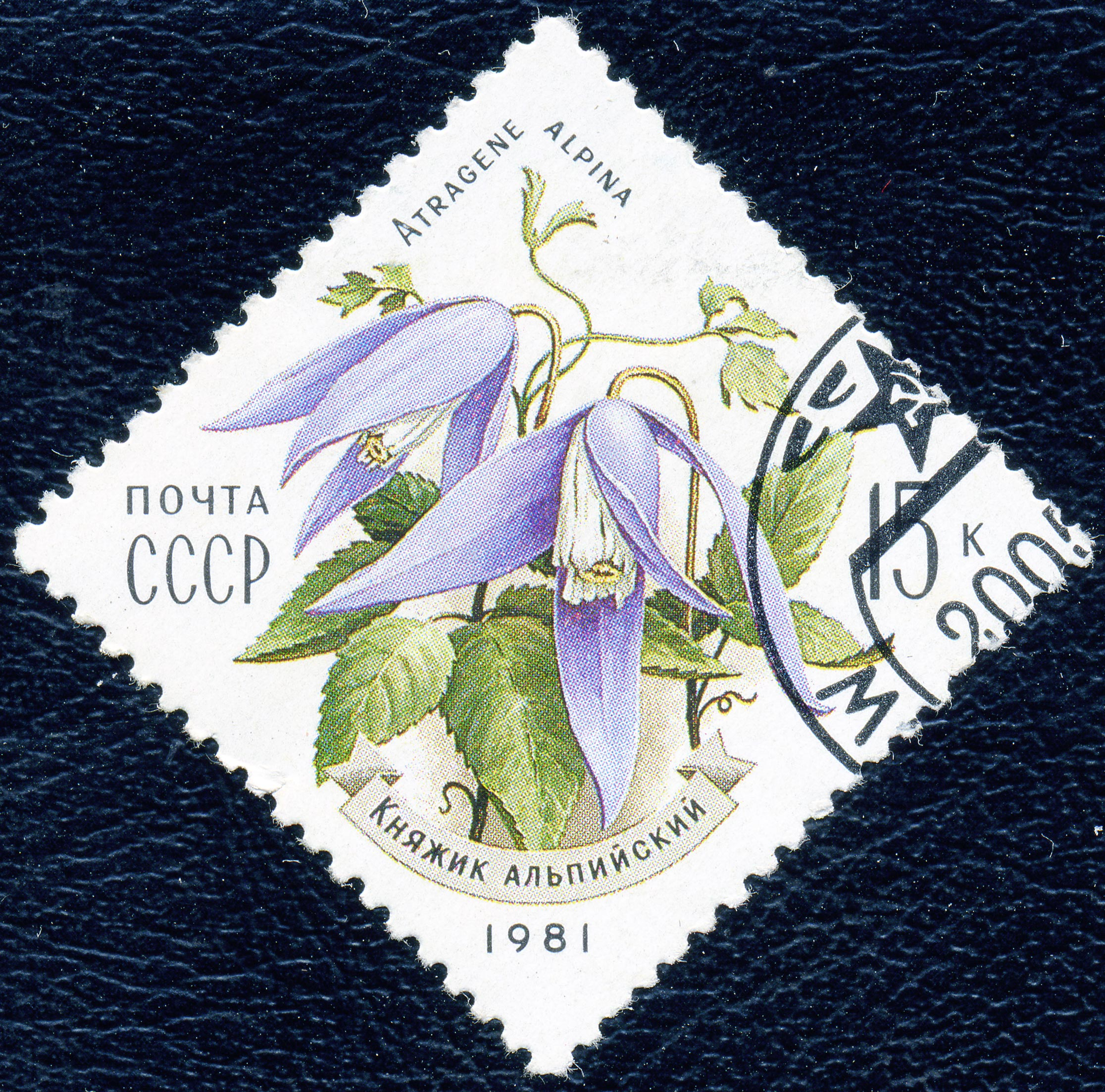 Почтовая марка СССР. 1981. Княжик альпийский